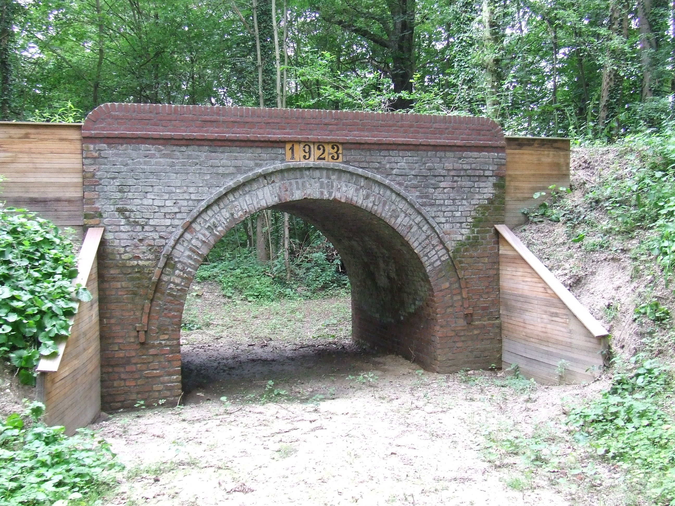 Middelste smalspoorviaduct bij Egypte, Tegelen